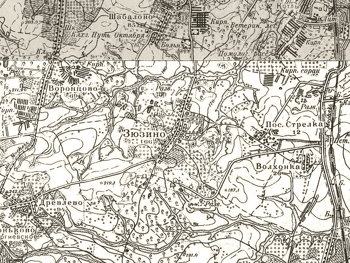 Москва и окрестности, 1931 год, фрагмент: посёлок Аннин (сейчас Чертаново).